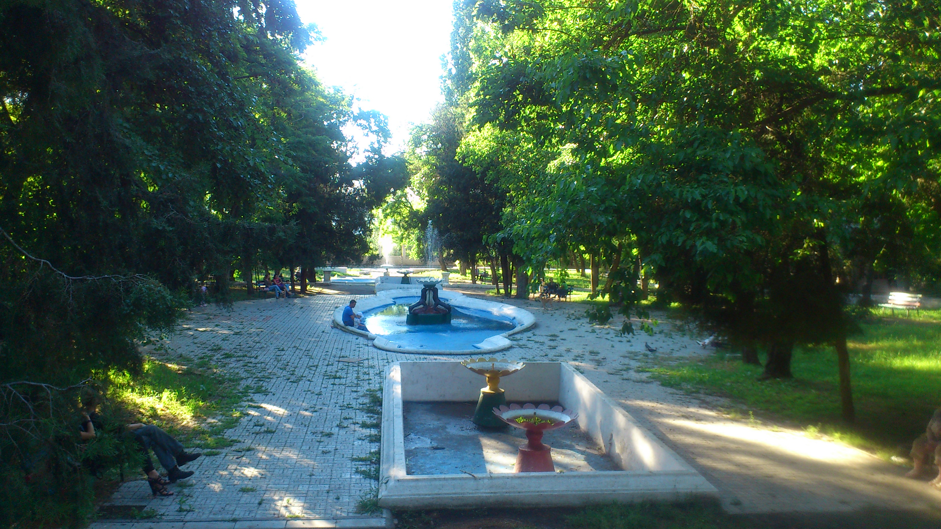 Сухий фонтан, Миколаїв